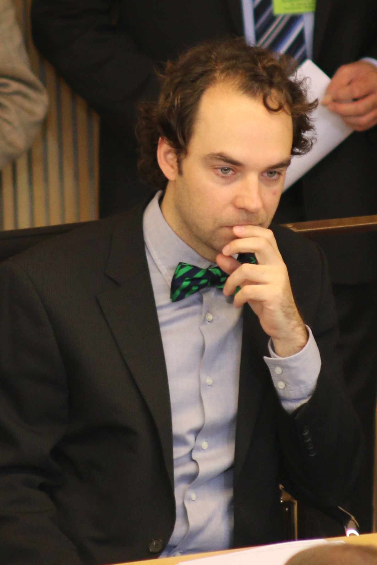 Konstituierende Sitzung des Hessischen Landtags 2014: Daniel May (MdL) von der Bündnis 90/Die Grünen-Fraktion